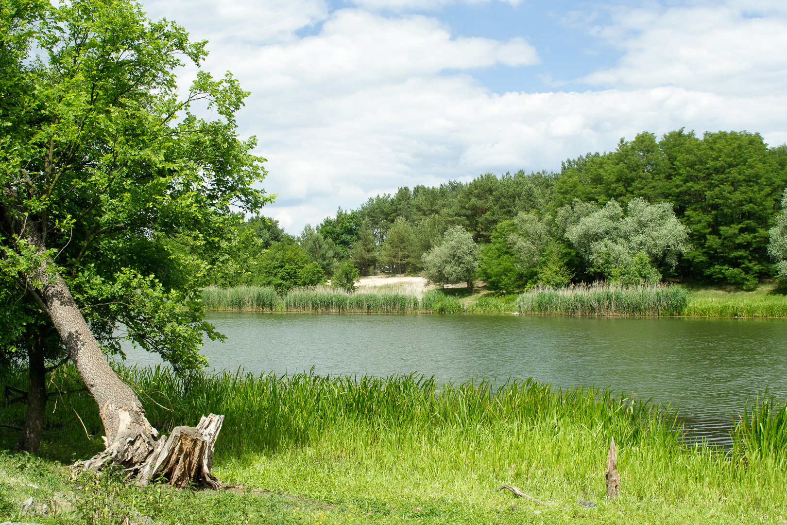 Starorzecze Wisły Jeziorko Łacha Nowowiejska na osiedlu Nowa Wieś w Józefowie k/Warszawy, widoczny wyższy prawy brzeg (skarpa tarasu nadzalewowego). This is a photography of Natura 2000 protected area with ID PLB140004